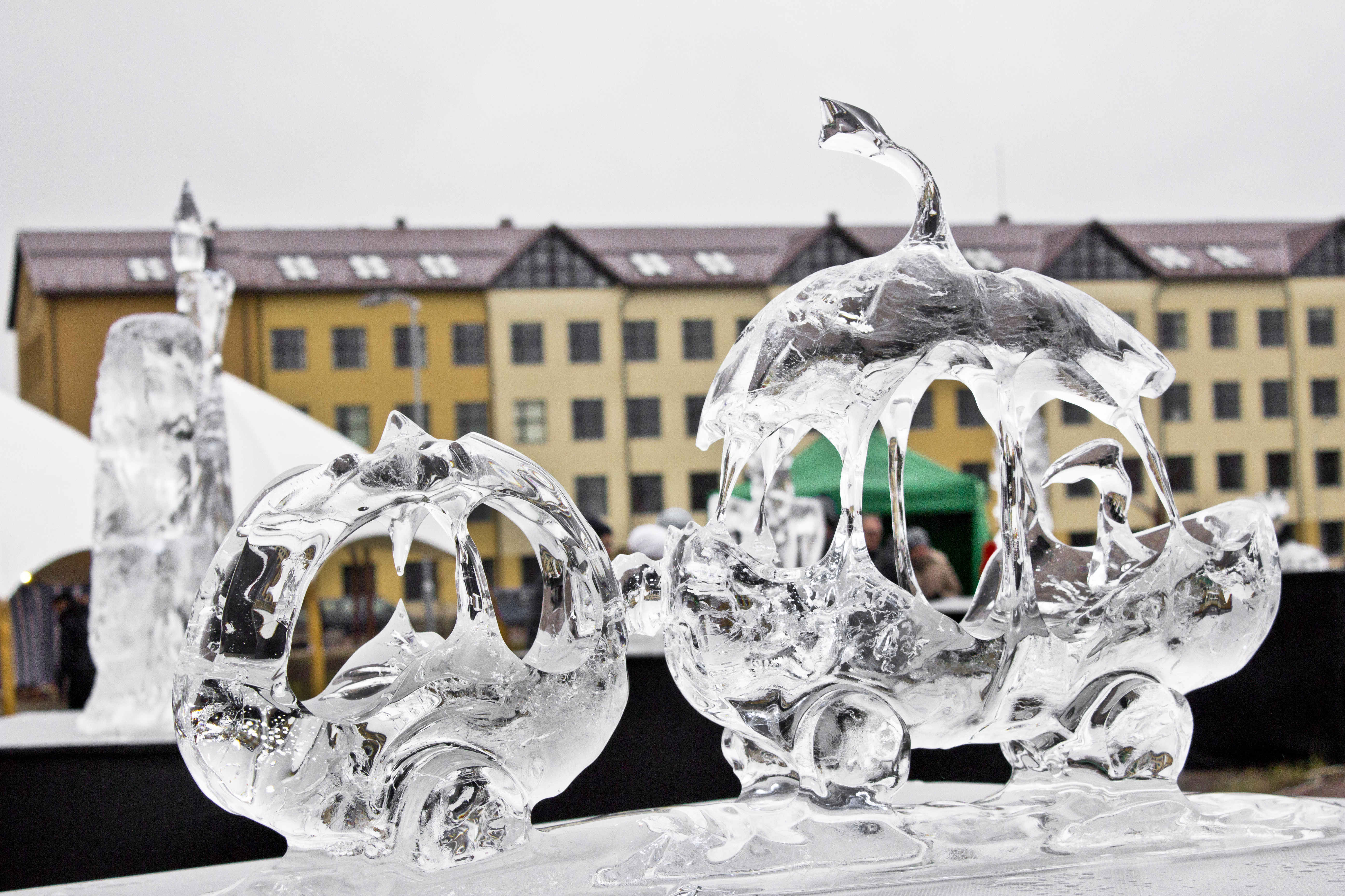 Jelgava, Pasta island